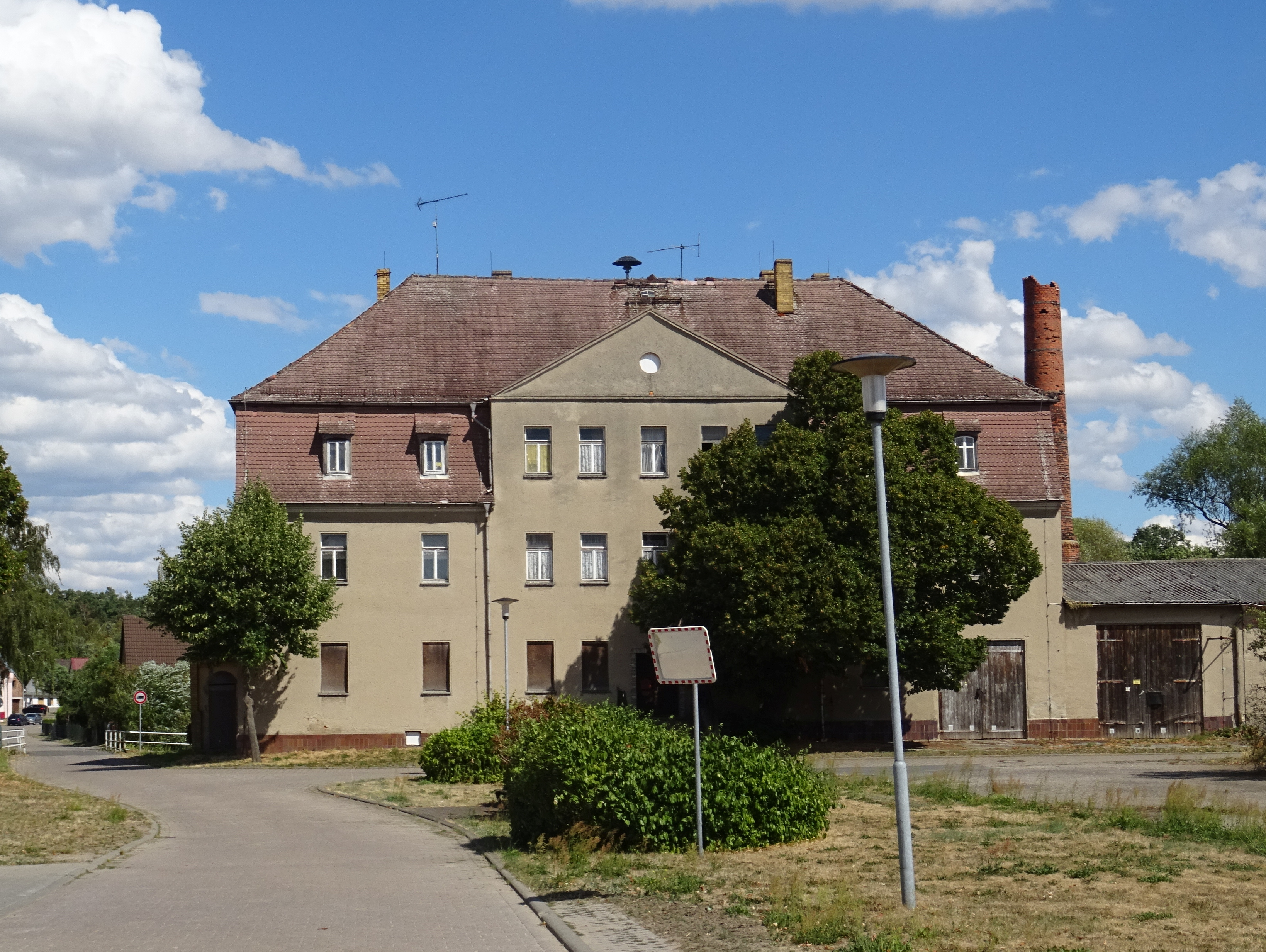 Sausedltz, denkmalgeschütztes Gutshaus